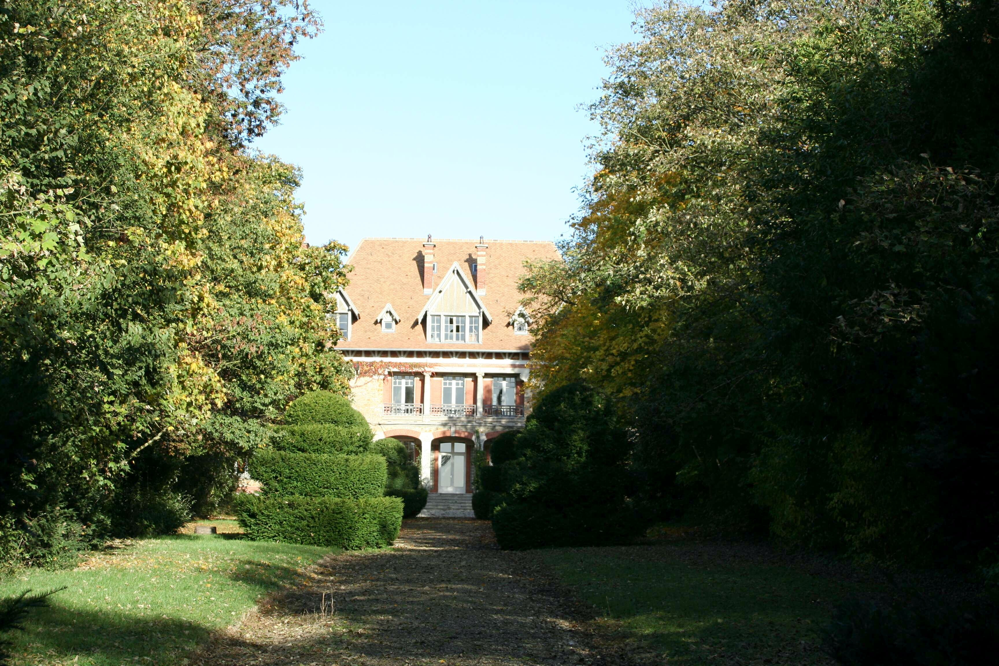 Château de Montgardé à Aubergenville - Yvelines (France)